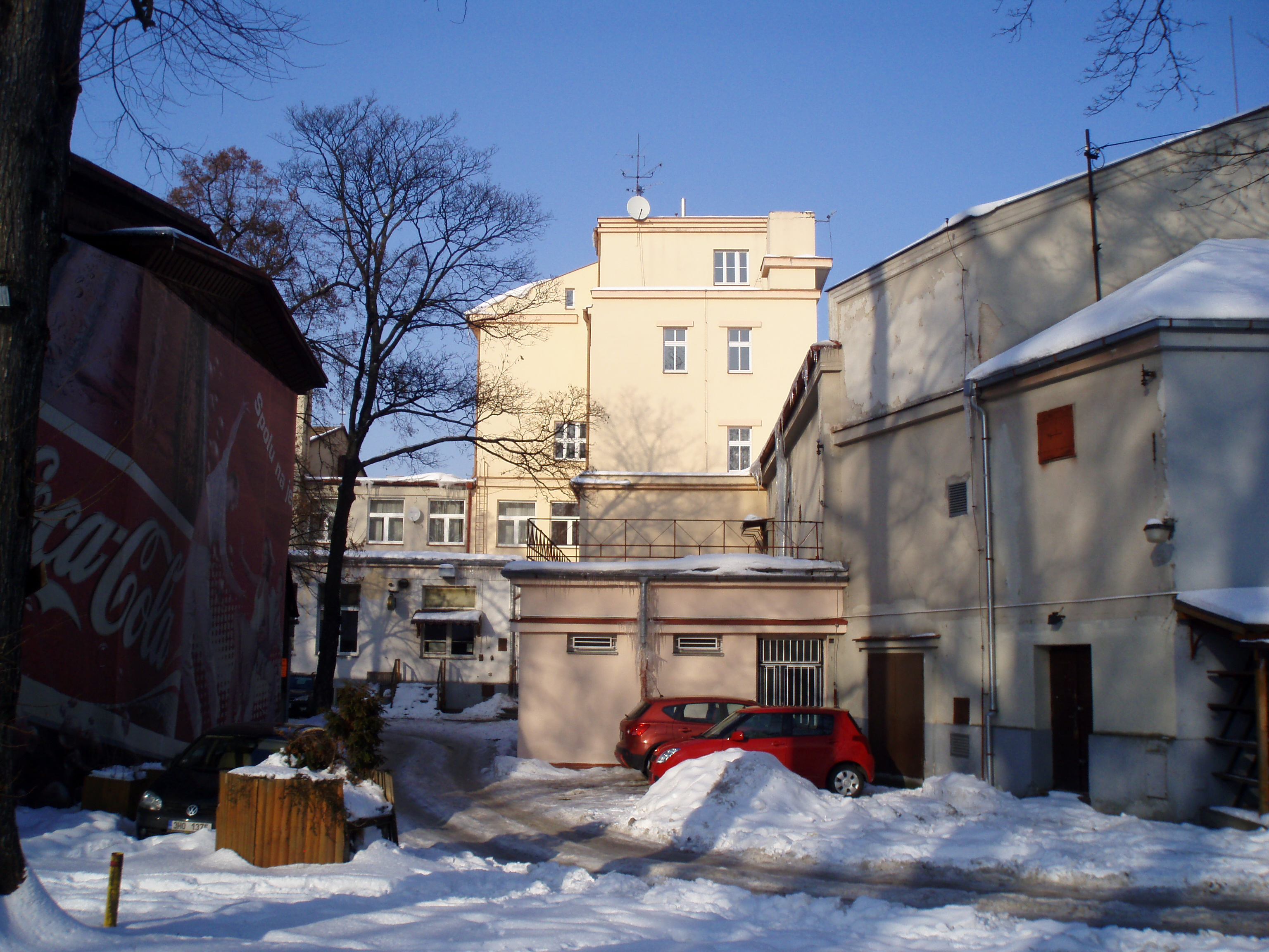 KD Střelnice (Hradec Králové)